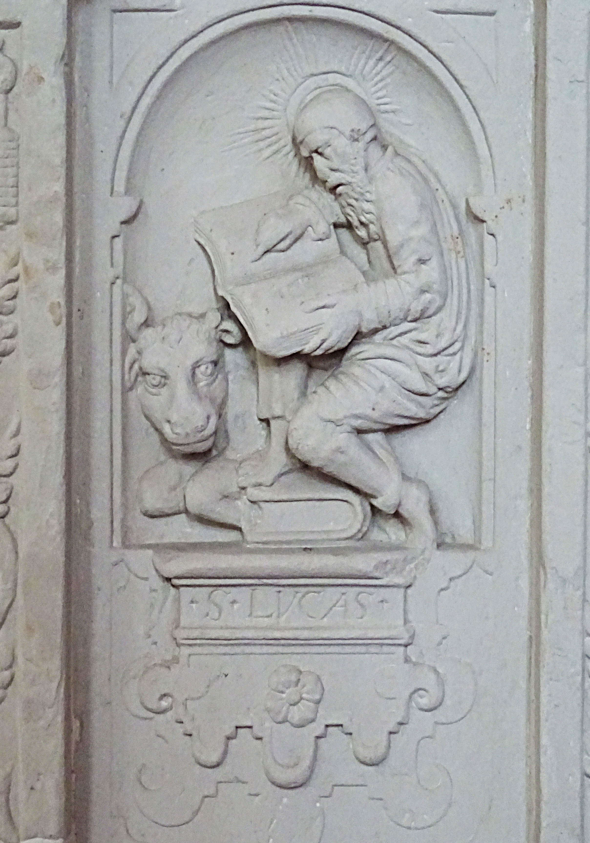 Steinbilderbibel in der St. Annenkirche (Eisleben), 28/29, Evangelist Lukas